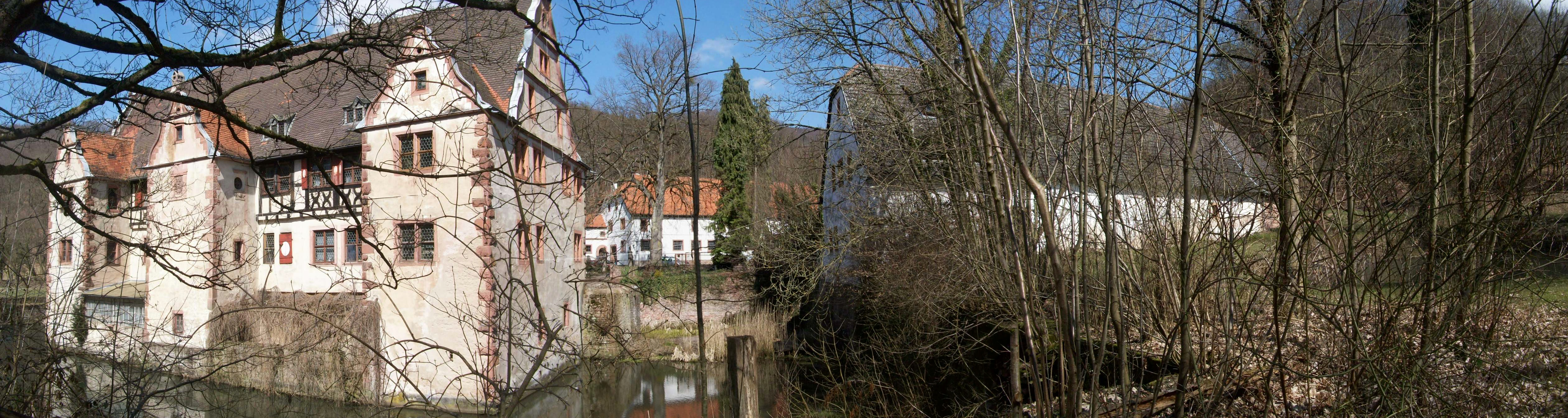 Wasserschloss Oberaulenbach, Panorama Südansicht